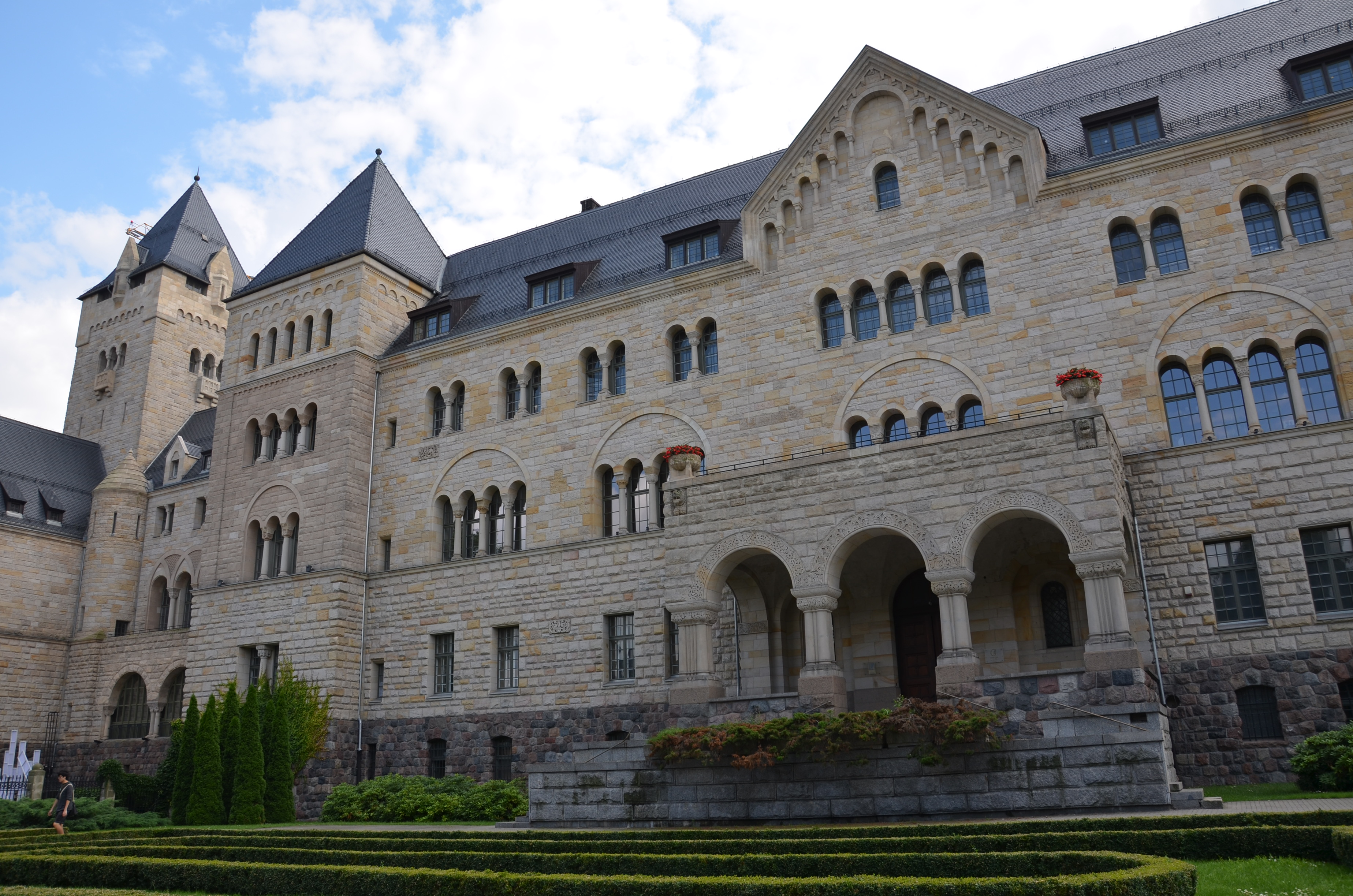 Poznań, nowy zamek, ob. centrum kultury, 1905-1945